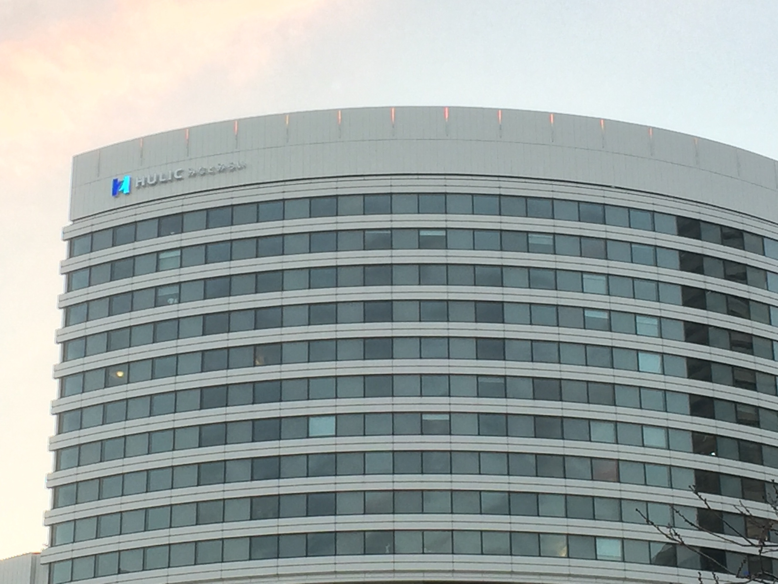 建物の名称が2017年12月にTOCみなとみらいから「ヒューリックみなとみらい」に改称された。